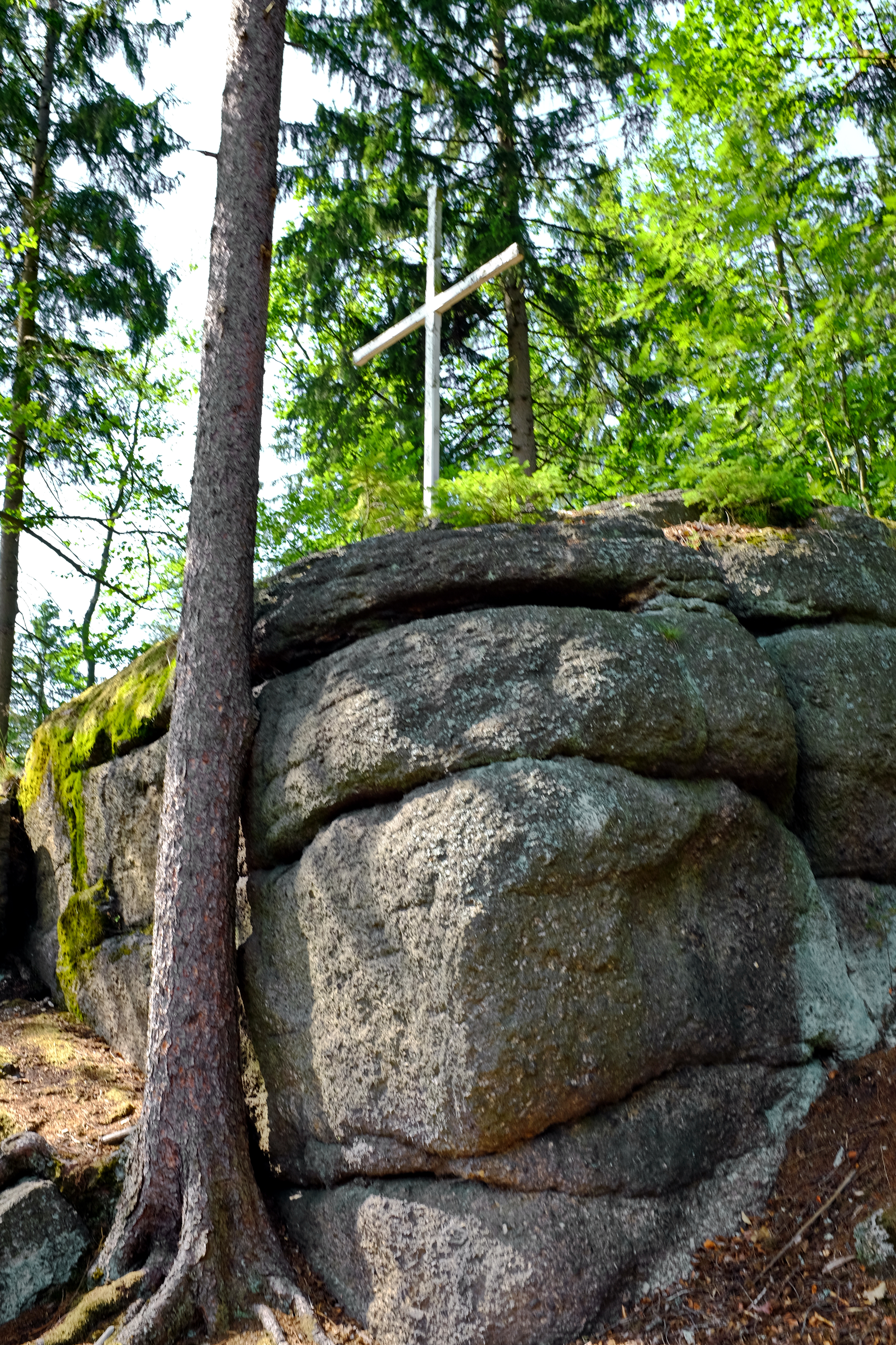 Karlovy Vary lázeňské lesy kříž na žulové skále